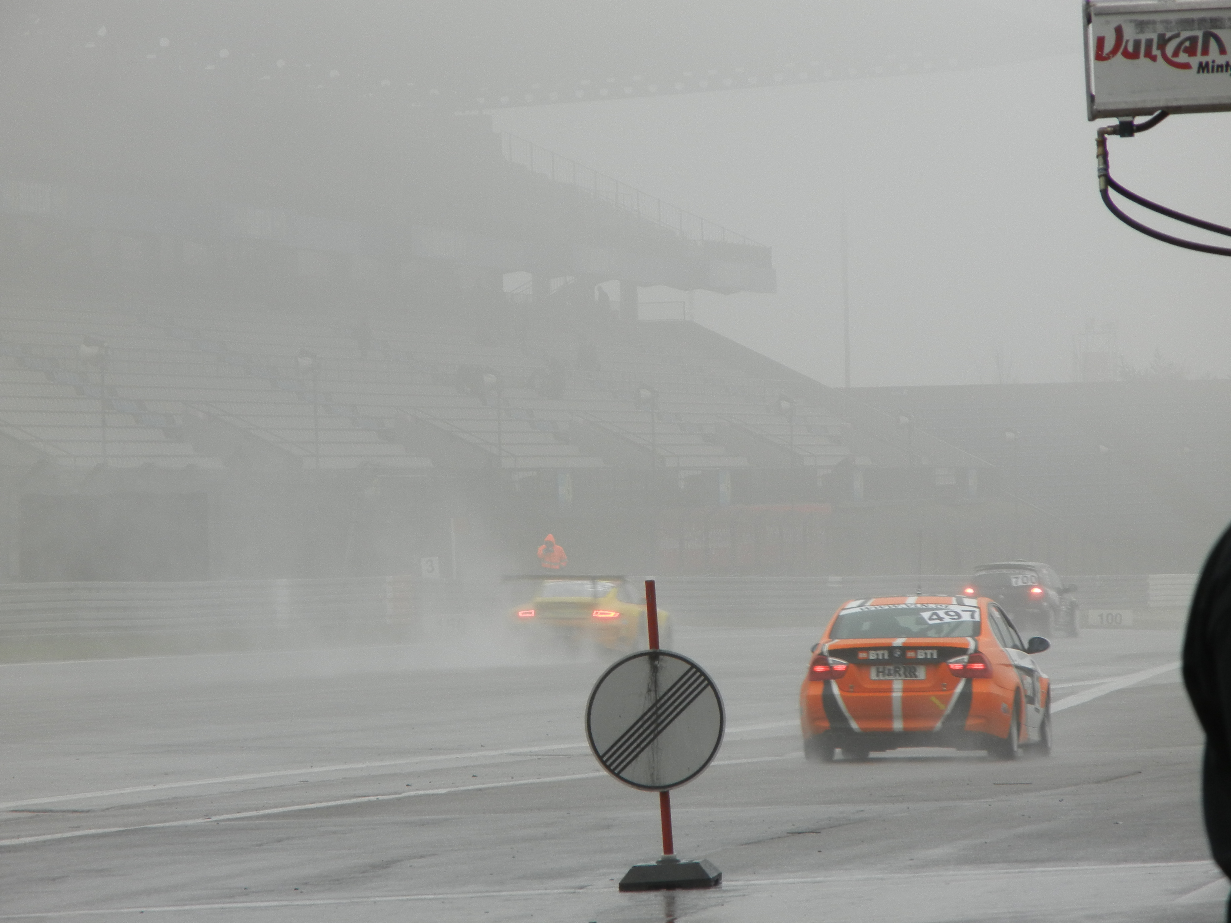 Starker Regen beim Auftaktrennen der VLN-Saison 2012. Foto wurde aus der Boxengasse aufgenommen. Das Rennen wurde kurz nach dieser Aufnahme aufgrund von schlechter Sicht und zu viel Wasser auf der Strecke abgebrochen.